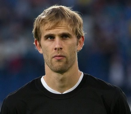 Іван Стринич під час виступів за Дніпро